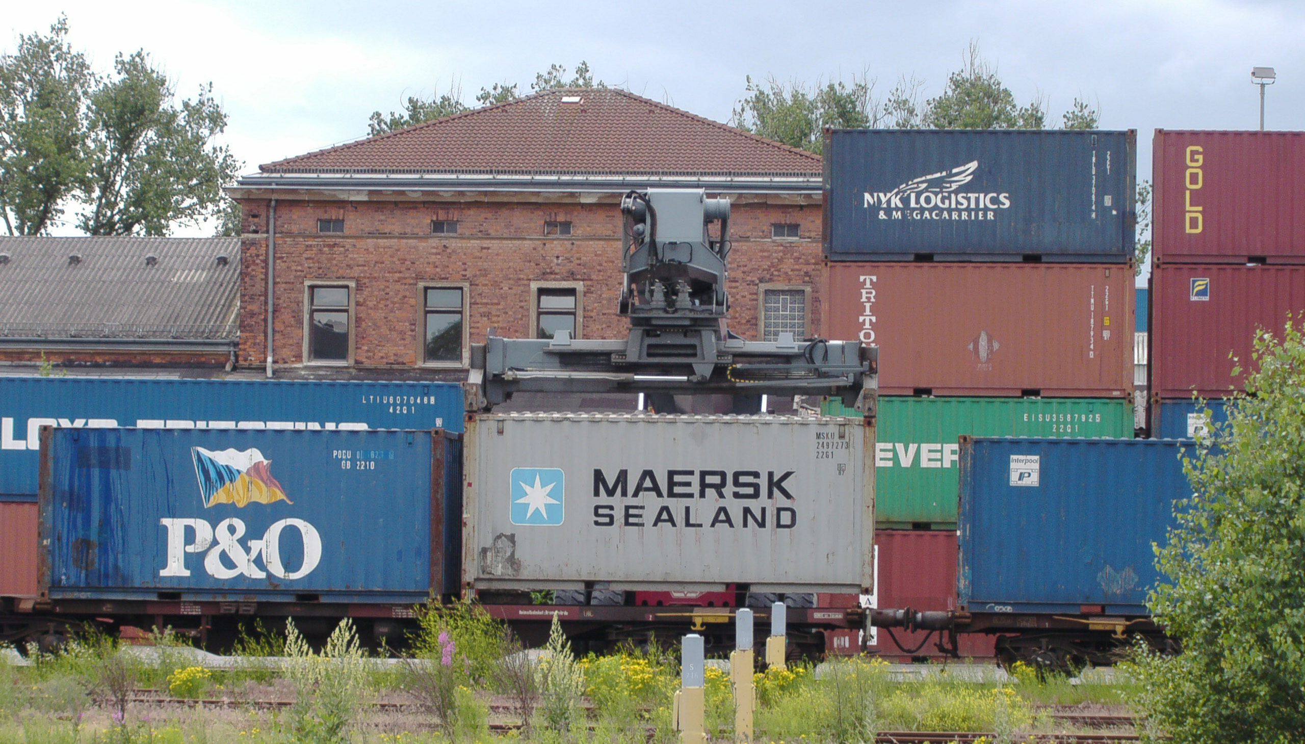 Containerverladung mittels Reach-Stacker in Hof (Saale) Hauptbahnhof.